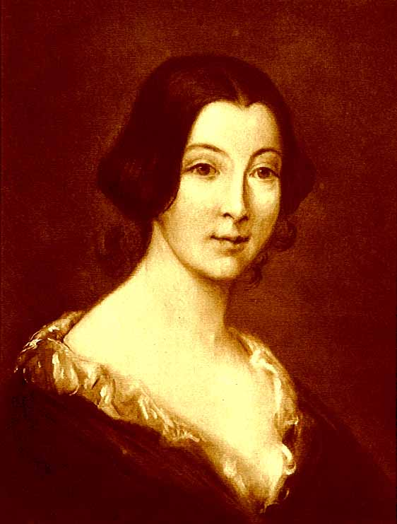 Clotilde de Vaux (1815-1846), née Clotilde-Marie de Ficquelmont, inspiratrice de Auguste Comte